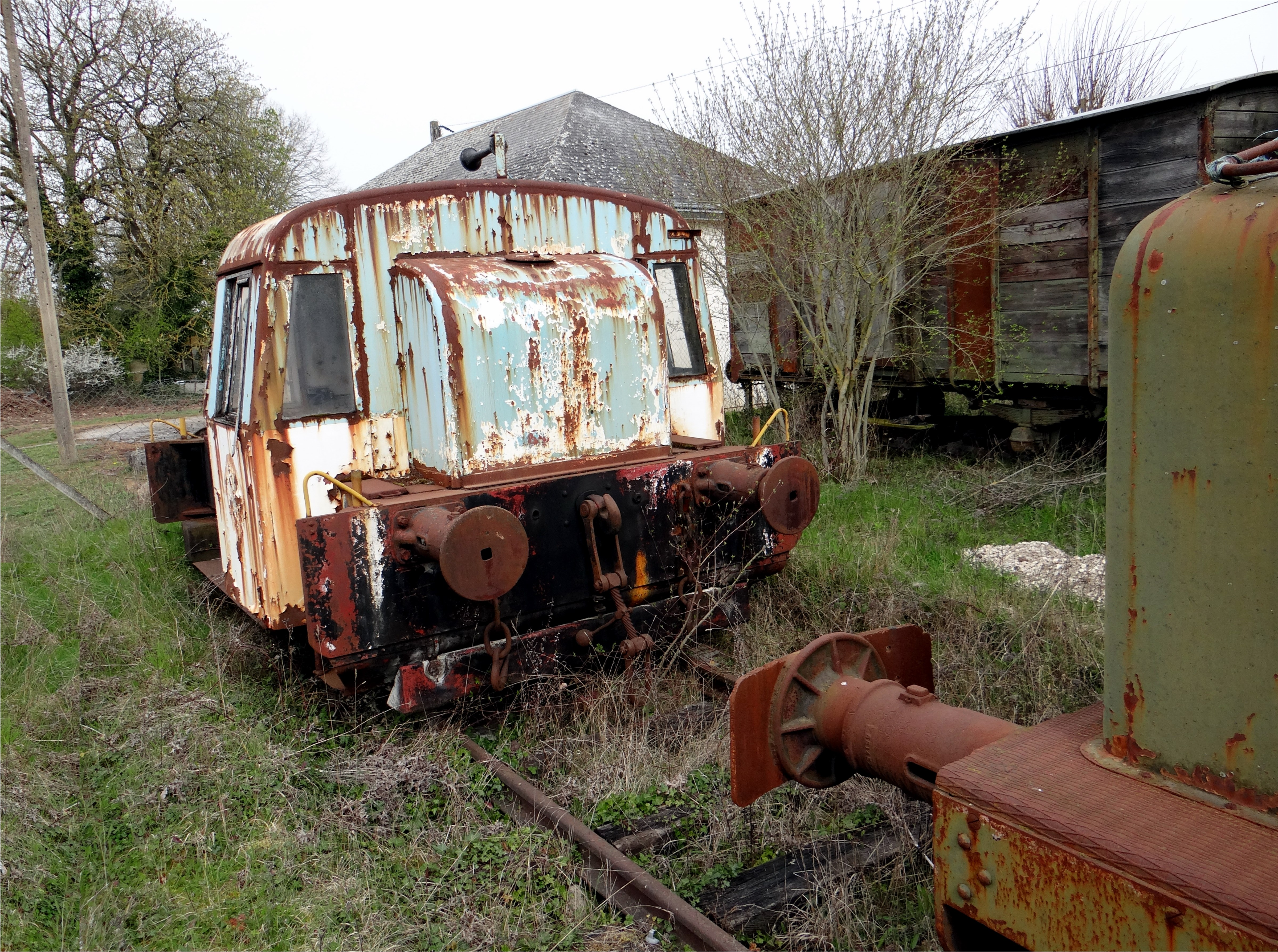 Un ancien locotracteur de la carrière Lambert de Cormeilles-en-Parisis, construit par Baudet Donon Roussel et stationné en gare de Gallardon-Pont à Bailleau-Armenonville, Eure-et-Loir, France.